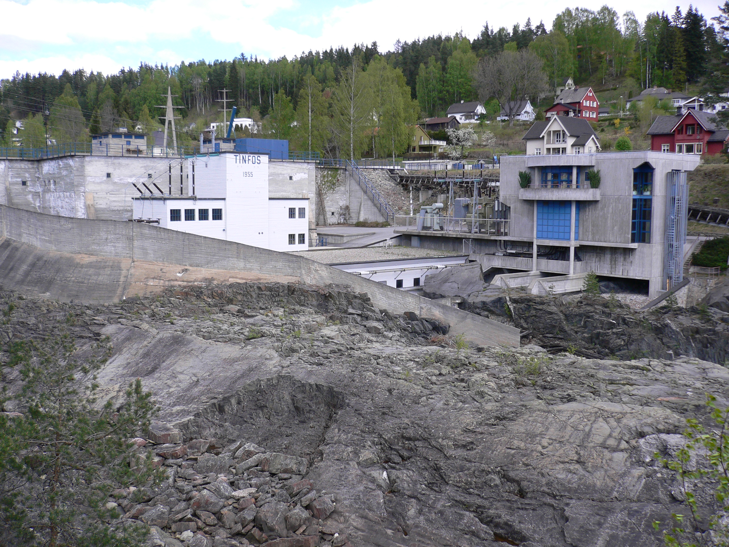 Nye Tinfos I kraftverk